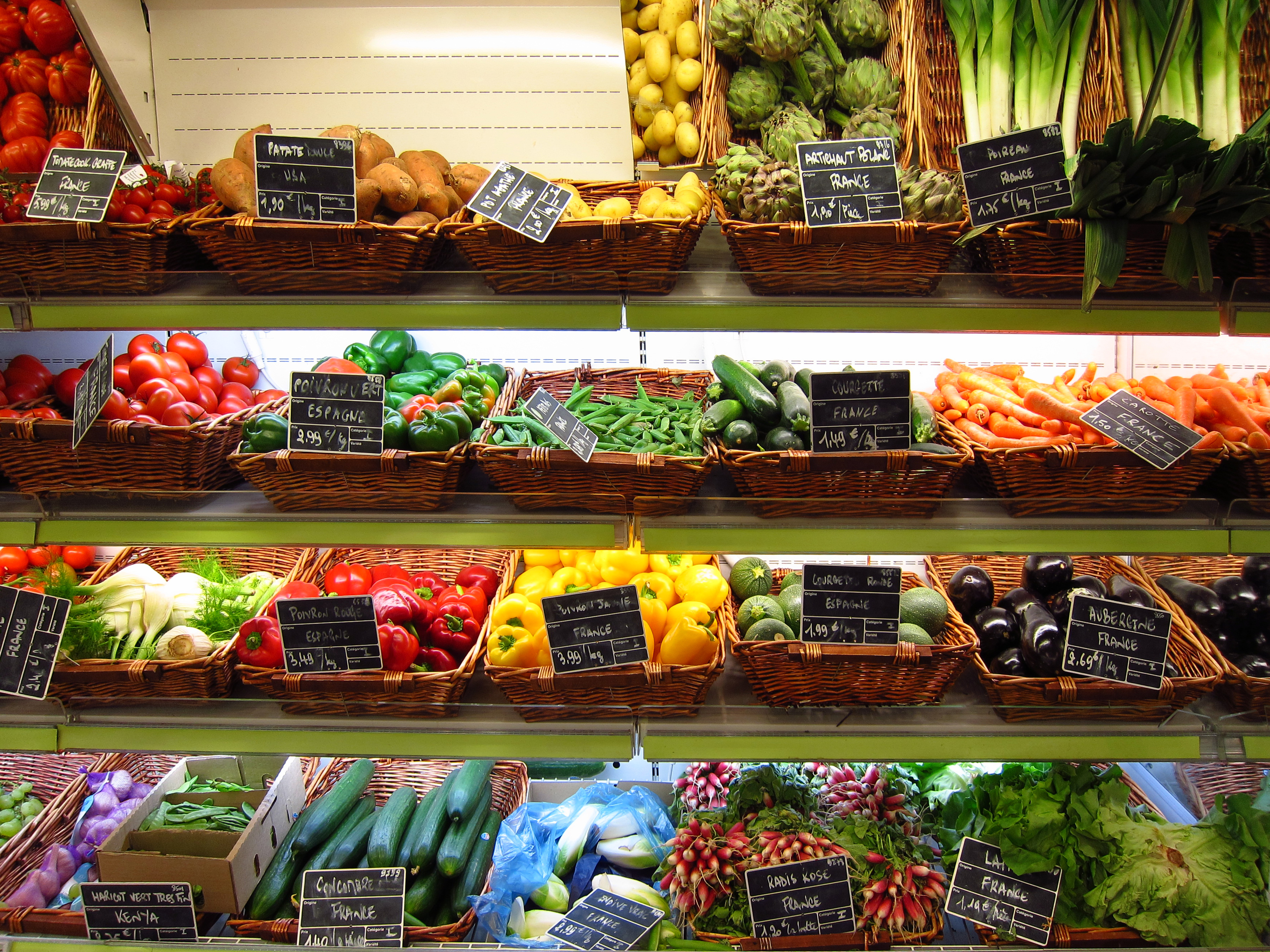 Paris (Île-de-France, France) : Le rayon légumes du Monop' de Bercy Village.